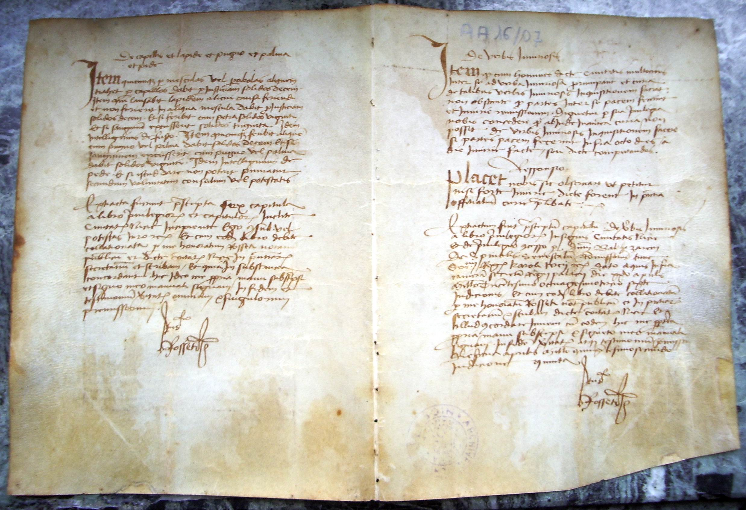 Copie d'une feuille de parchemin provenant d'un cartulaire de la ville de Nice.